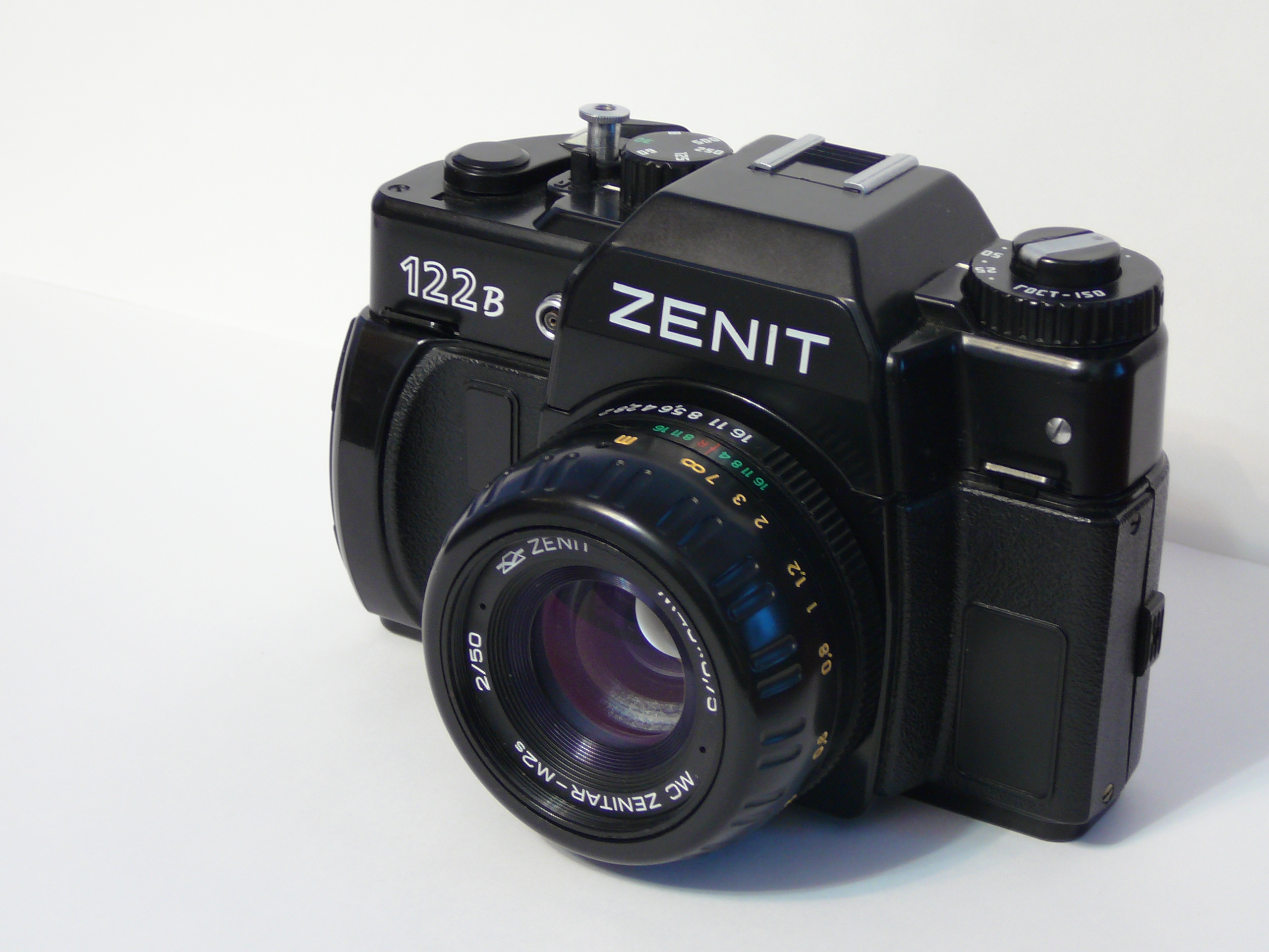 Зеркальный фотоаппарат Зенит-122В